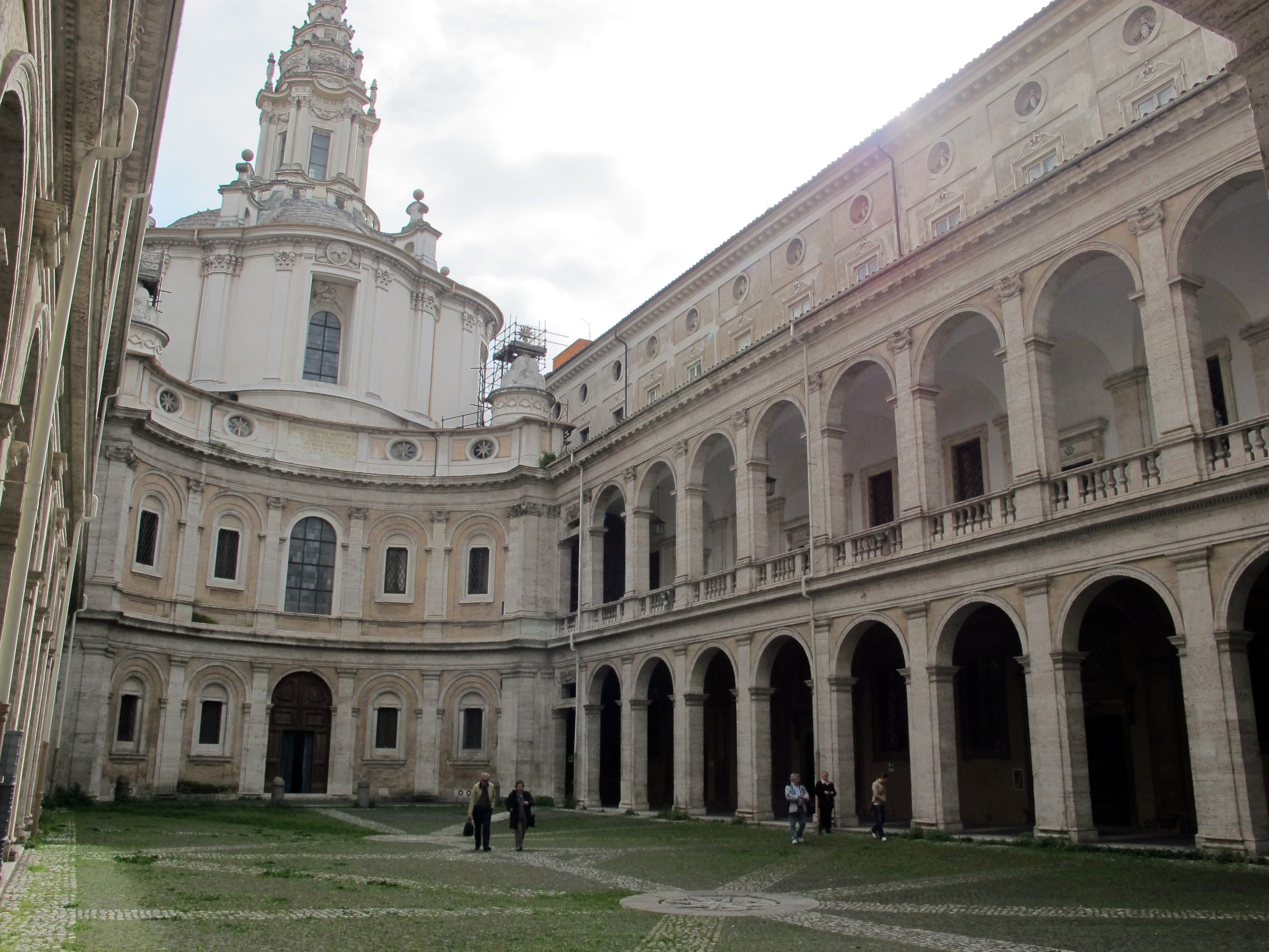 Sant'ivo alla sapienza, cortile